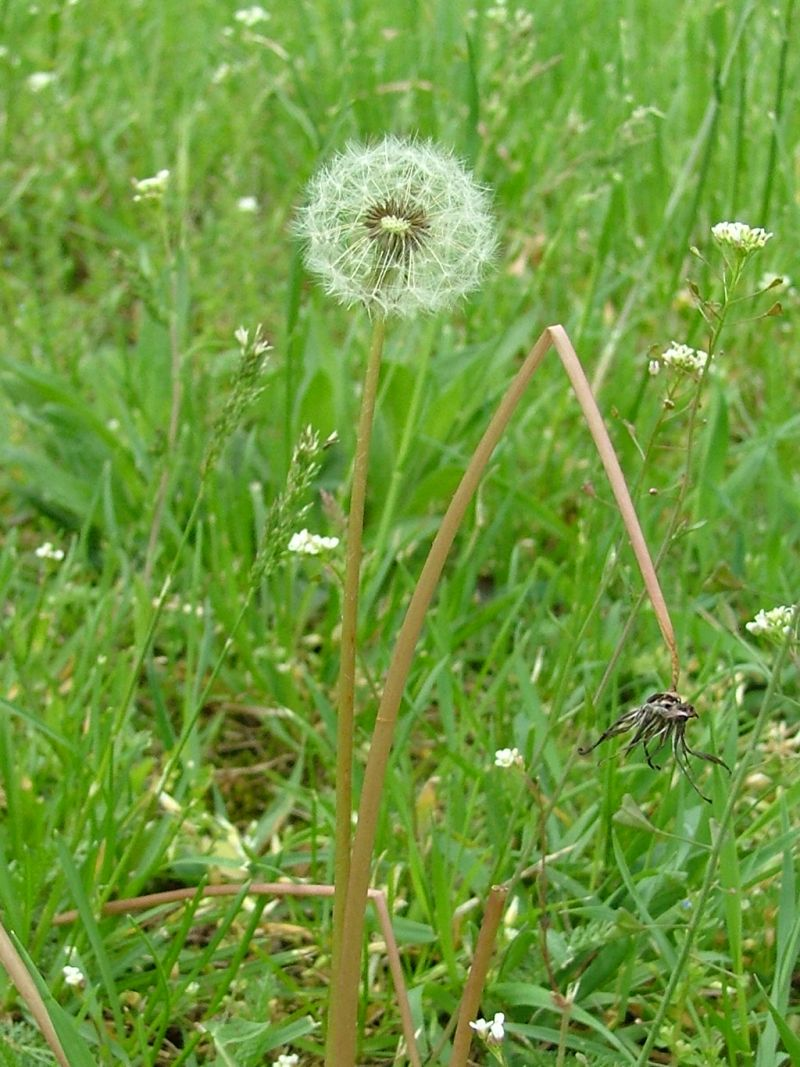 Taraxacum, Mniszek lekarski (Taraxacum officinale F. H. Wigg.)